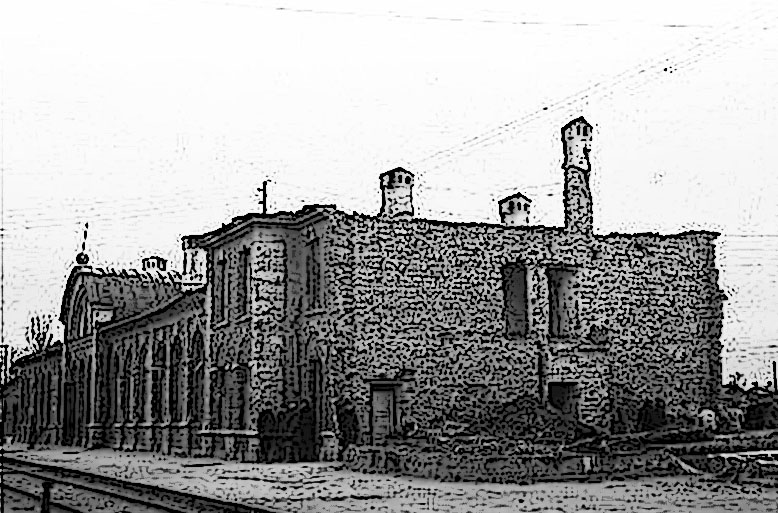 Вокзал "Тапа" после пожара, осень 1944 года (рисунок)